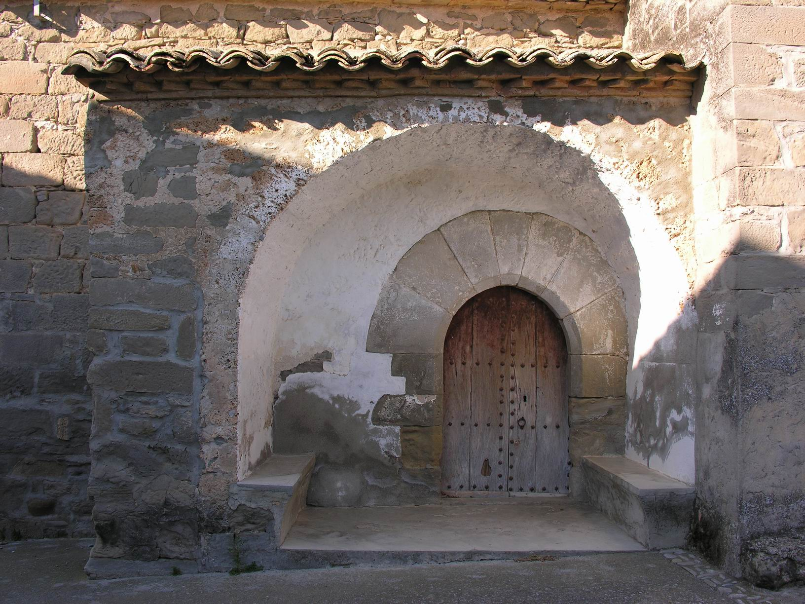 Aragonés: Portalada d'a ilesia de Lamata, en o termin municipal de l'Abizanda.